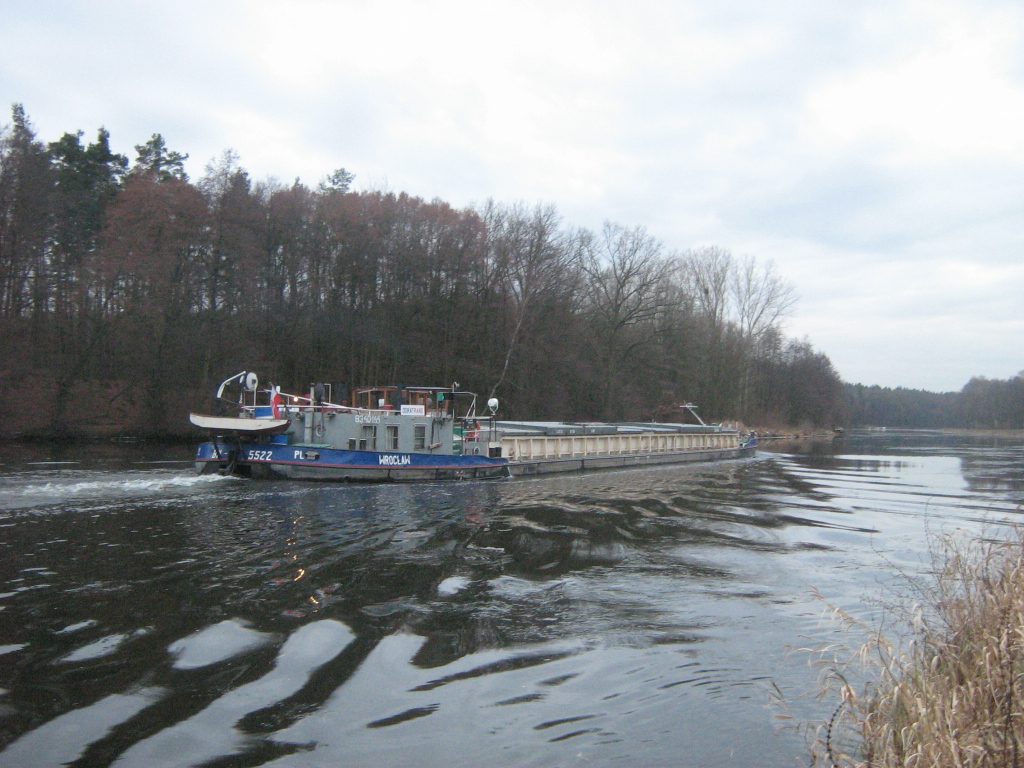 Frachtschiff auf dem Oder-Havel-Kanal bei Neuholland, Landkreis Oberhavel, Brandenburg